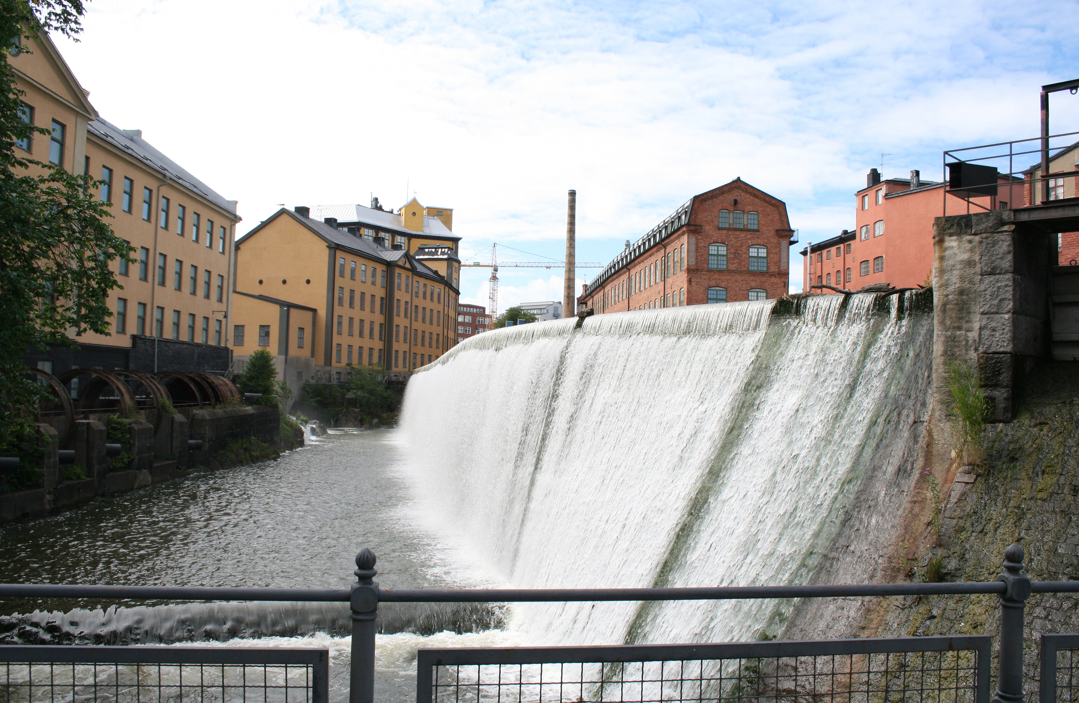 Motala Ström "Nörrköping"